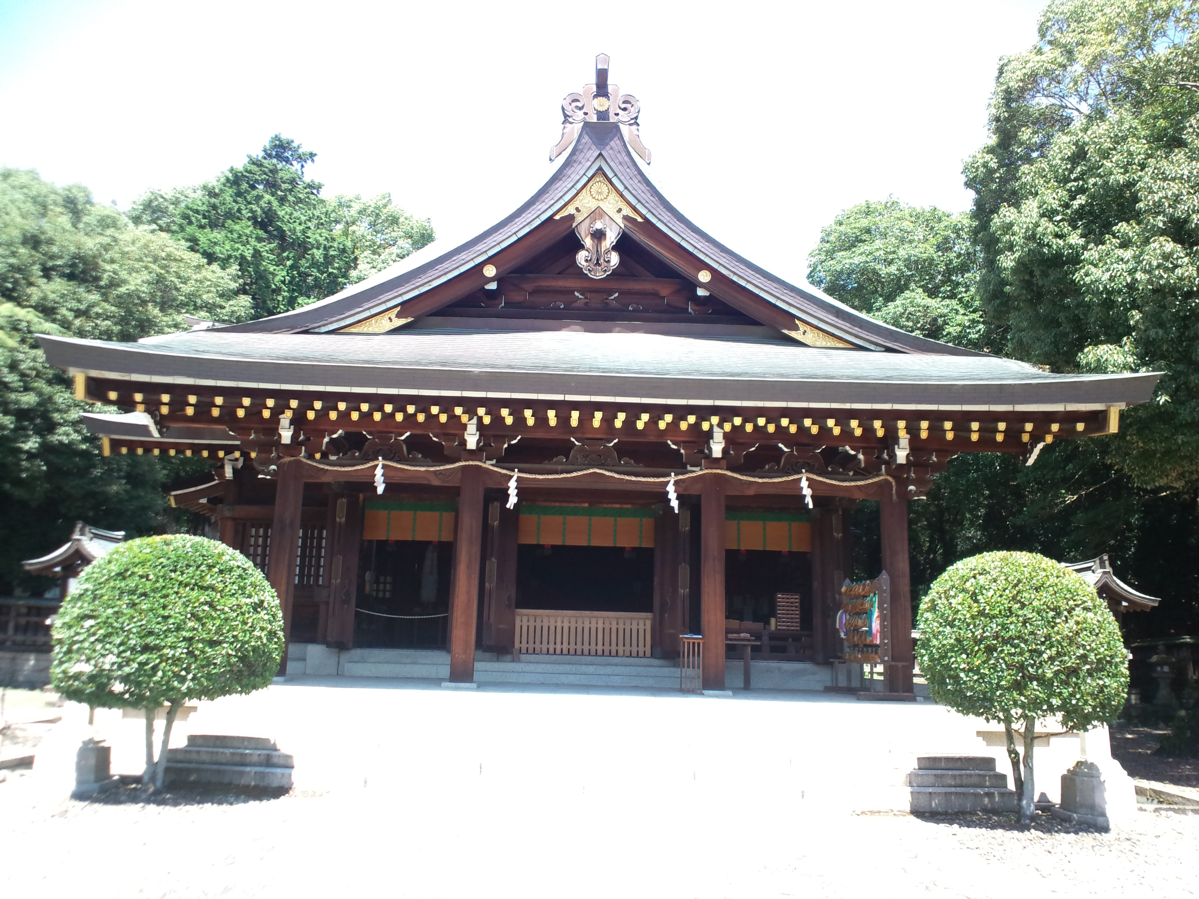 竈山神社 拝殿